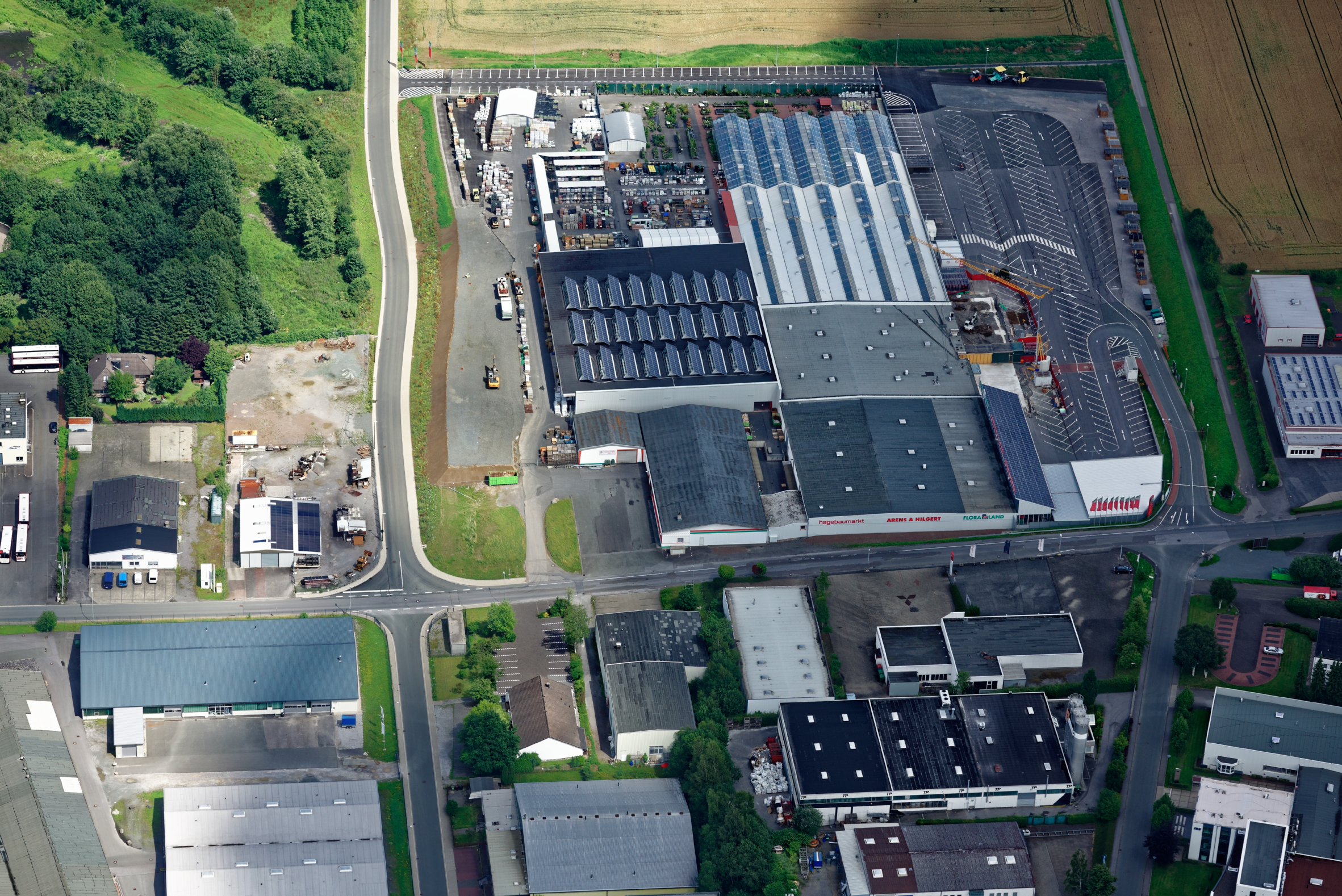 Fotoflug Sauerland West. Luftaufnahme: Neuenrader Gewerbegebiet mit Hagebaumarkt, Nordrhein-Westfalen.